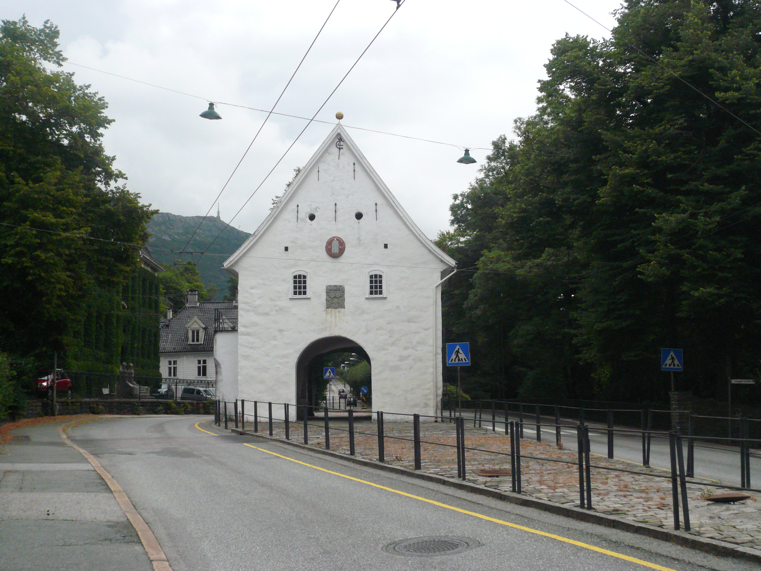 Stadsporten i Bergen